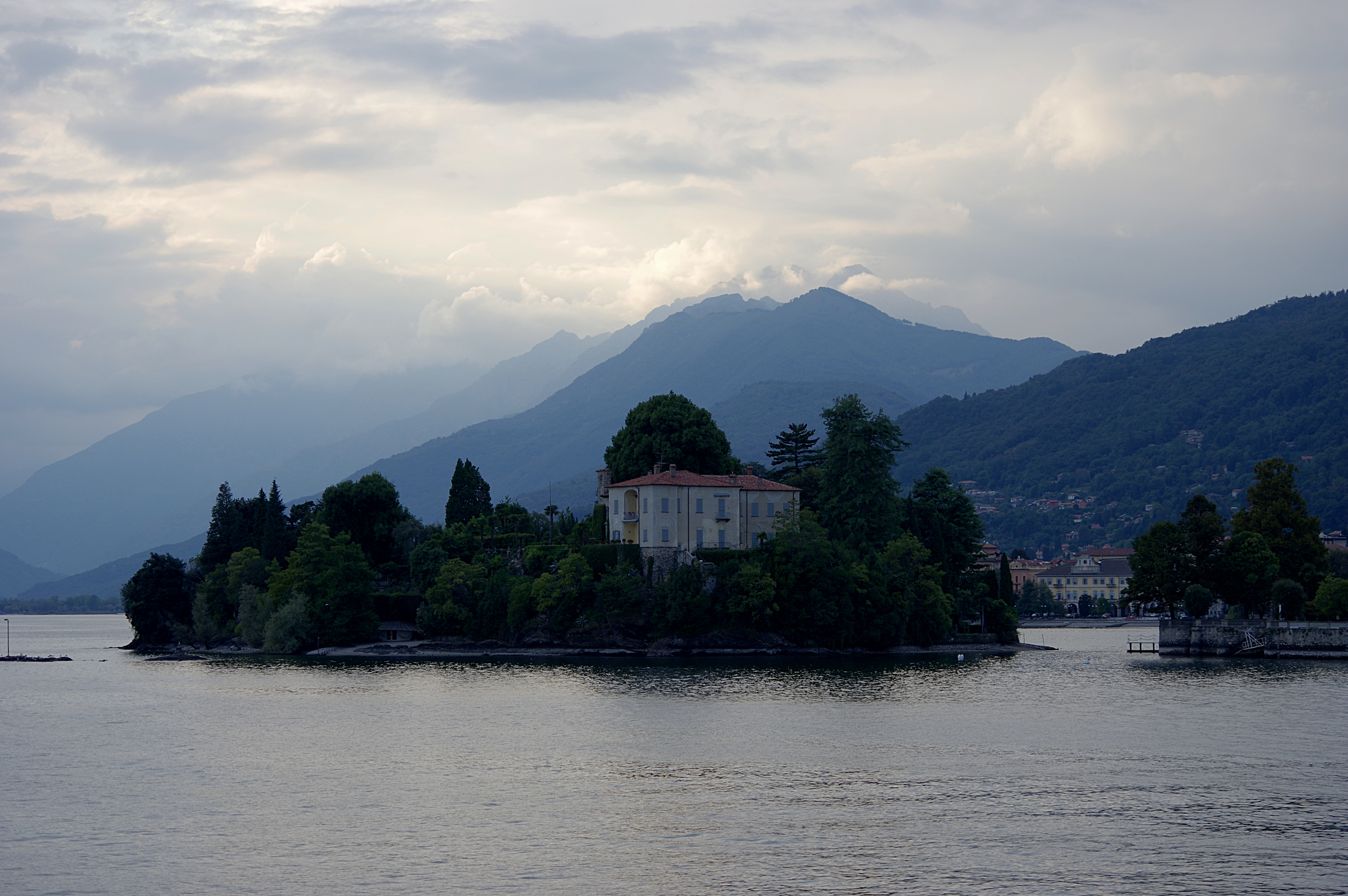 Lago Maggiore in Italien. Die Isolino di San Giovanni befindet sich vor Pallanza einem Ortsteil von Verbania. Das Bild wurde von einem Schiff auf dem Lago Maggiore aufgenommen. Es sit die kleinste der Borromäische Inseln.